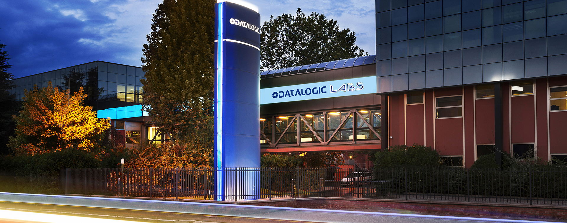 La sede dei Datalogic Labs di Lippo di Calderara di Reno (BO)